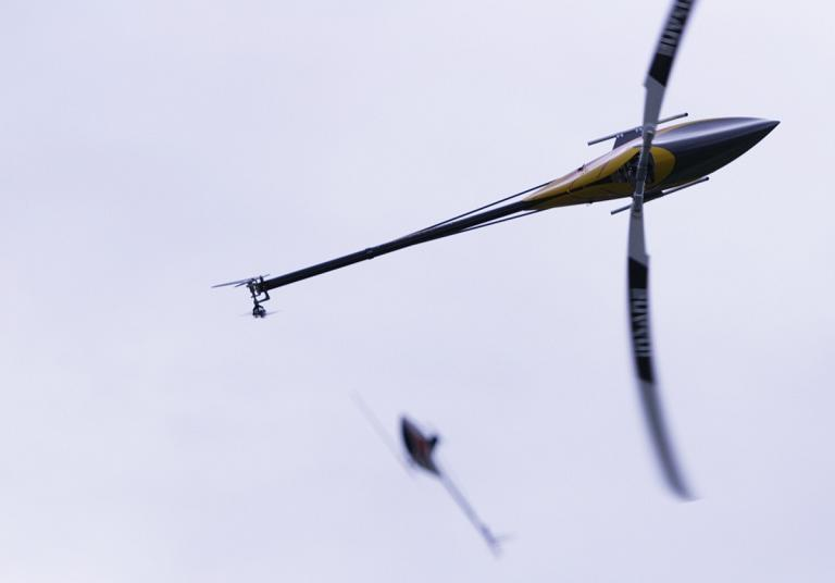 Zwei Modellhelikopter bei unterschiedlichen Flugmanövern